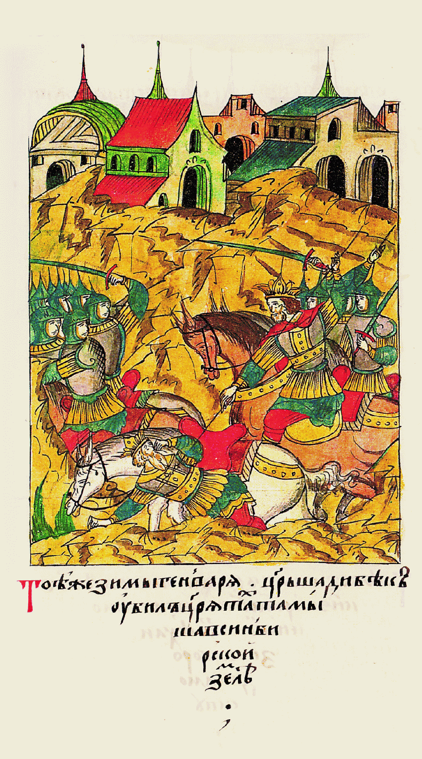 В ту же зиму месяца января царь Шадибек убил царя Тохтамыша в Сибирской земле